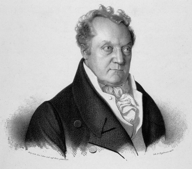 Porträt von Paul Usteri. Lithographie von Gottfried Engelmann (1788-1839) nach Hans Jakob Oeri (1782-1868)